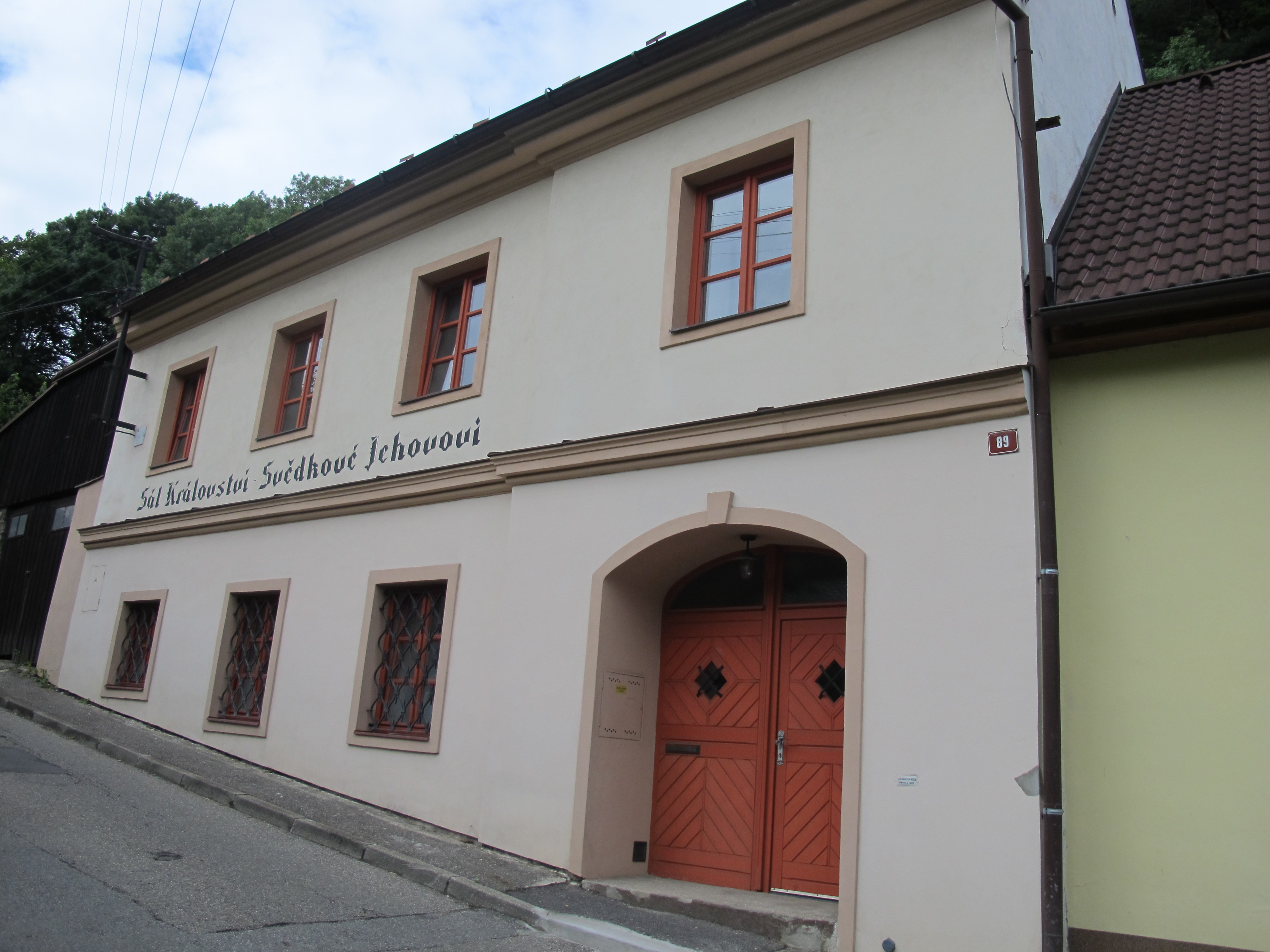 Vimperk - Svědkové Jehovovi